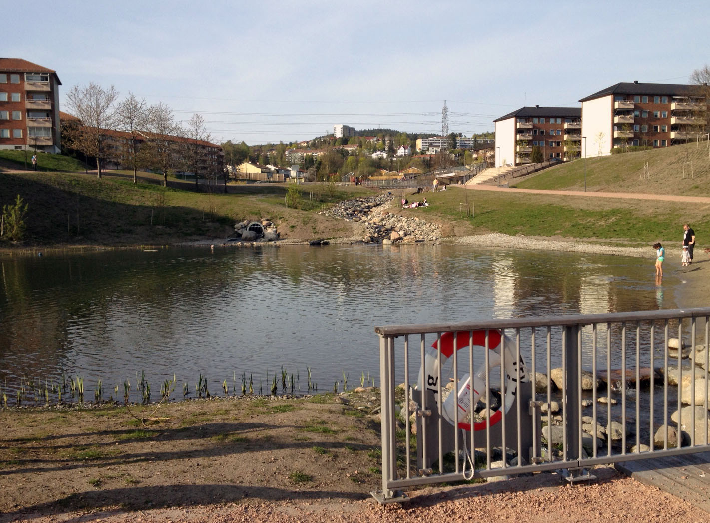 Hovinbekken renner ned gjennom Bjerkedalen park i Oslo til badedammen helt sør i parken.